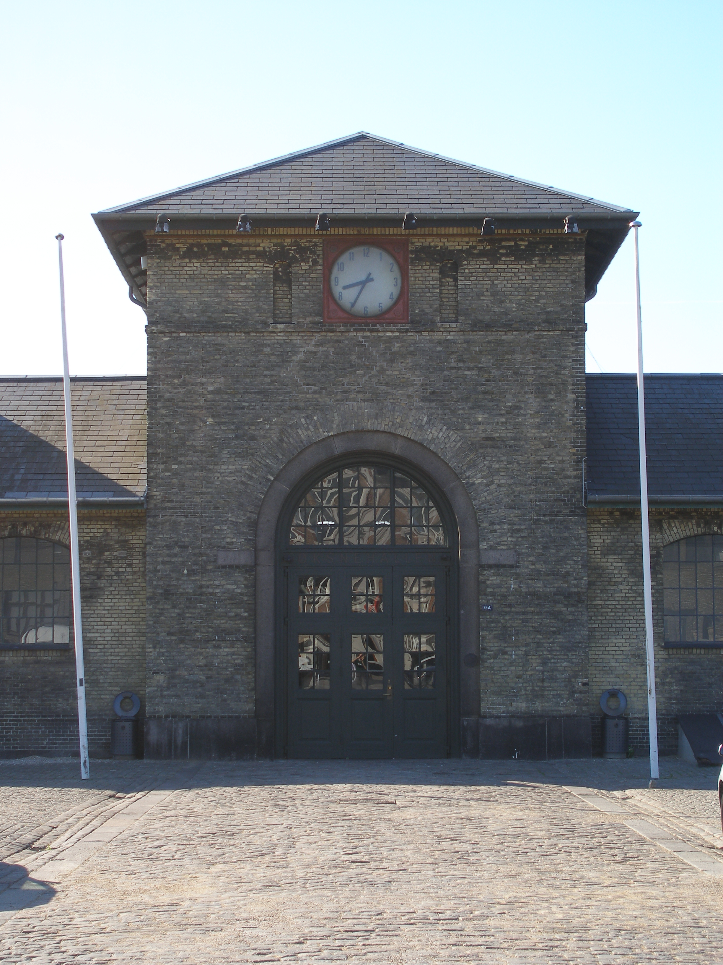 Øksnehallen, hovedindgang fra Kvægtorvet (fotografen stod mellem Øksnehallen og Halmtorvet, midt på Kvægtorvet)